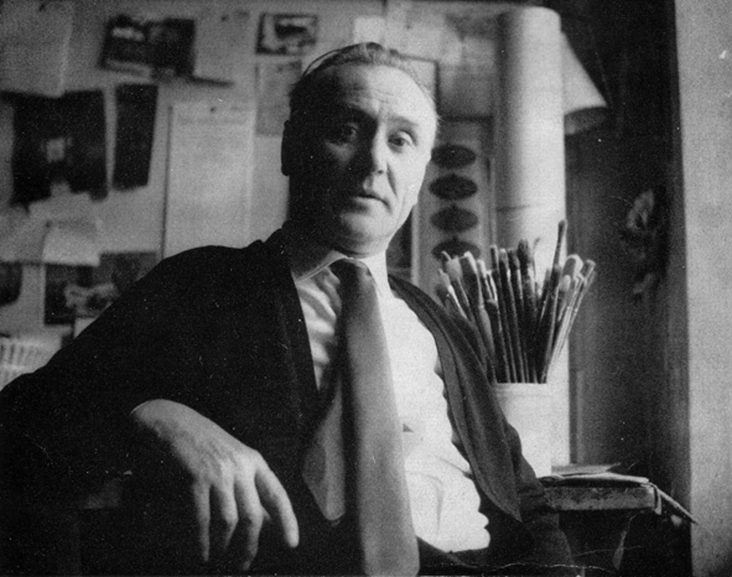 Leonardo Spreafico